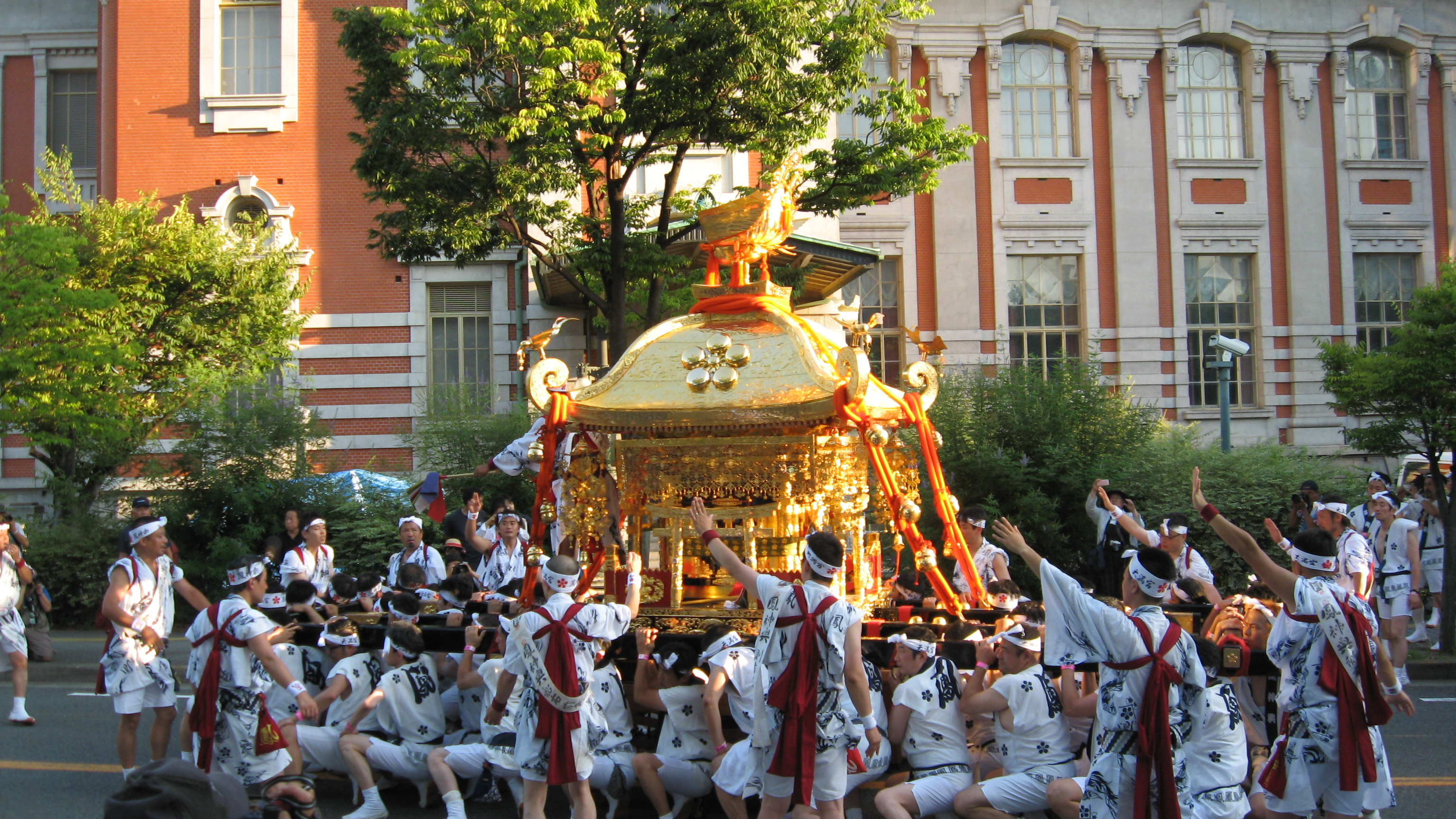 Tenjin festivalio paradas su gabenamu mikoshi